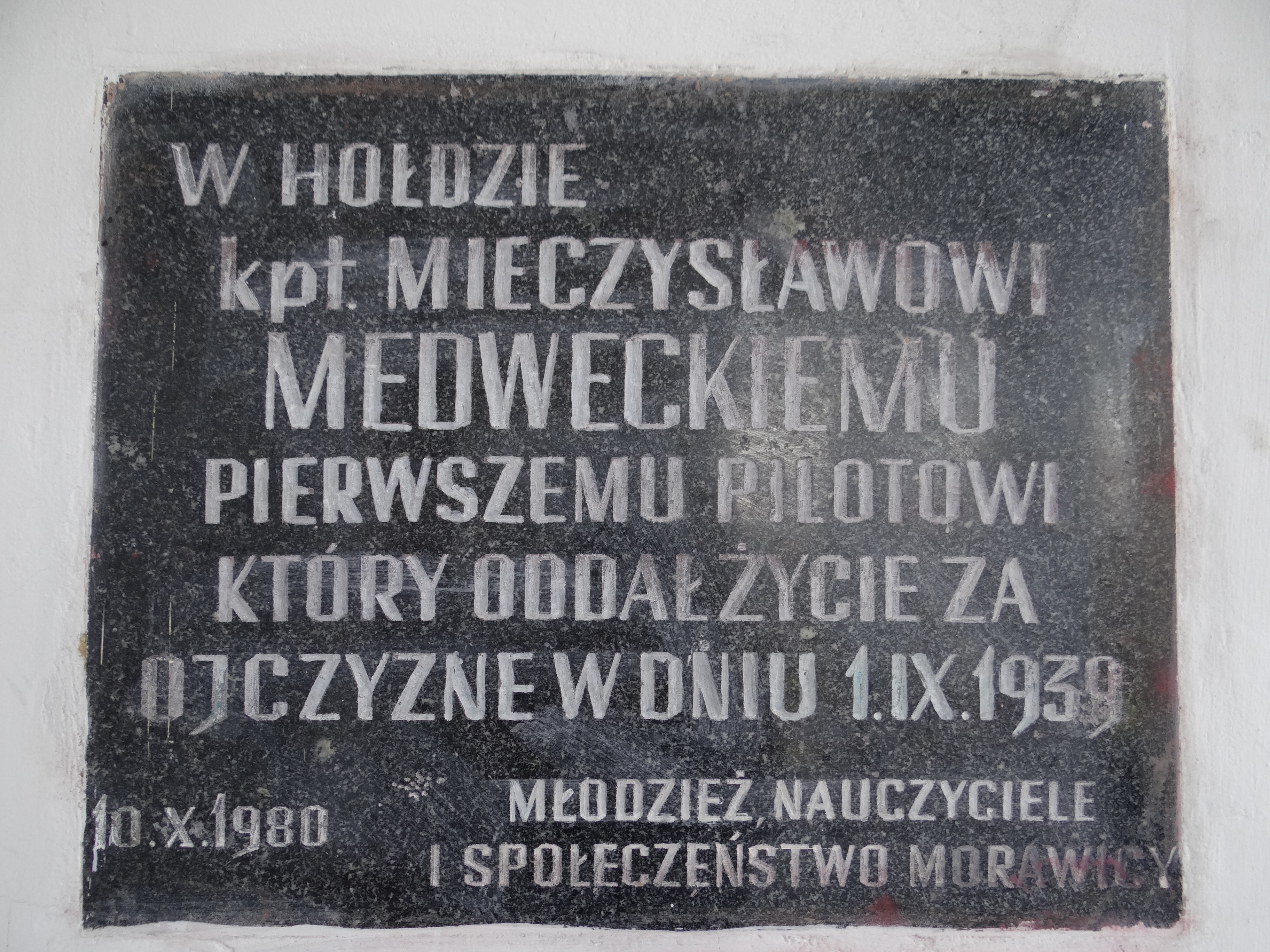 Morawica, dwór, ob. szkoła podstawowa, po 1920